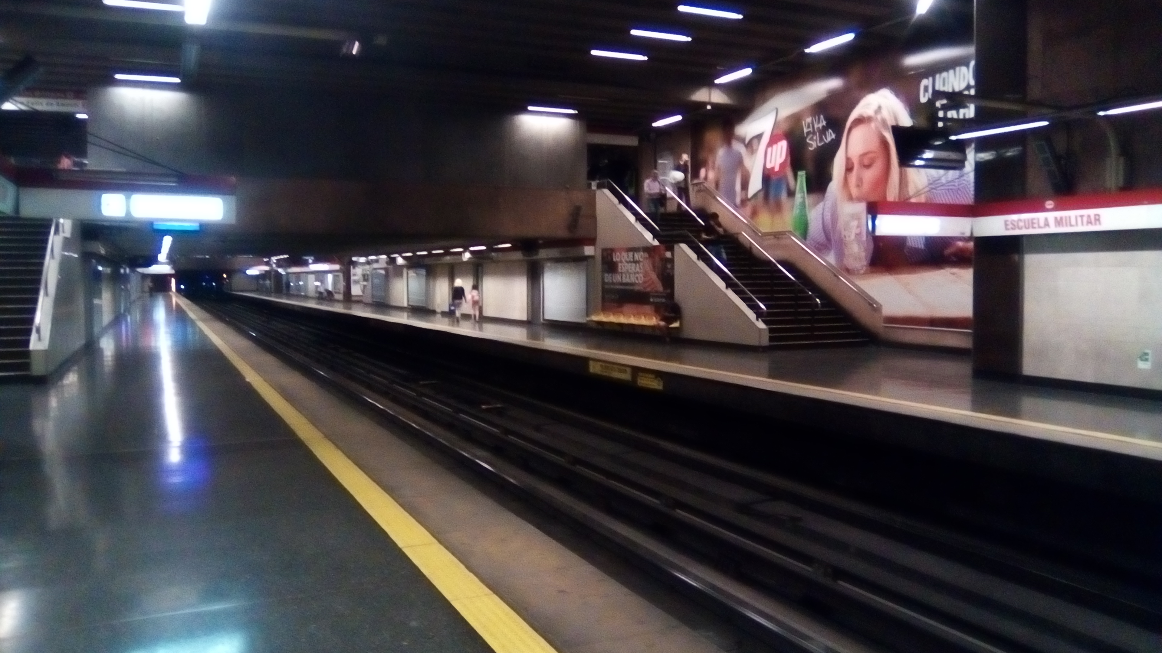 Estación Escuela Militar (2018)